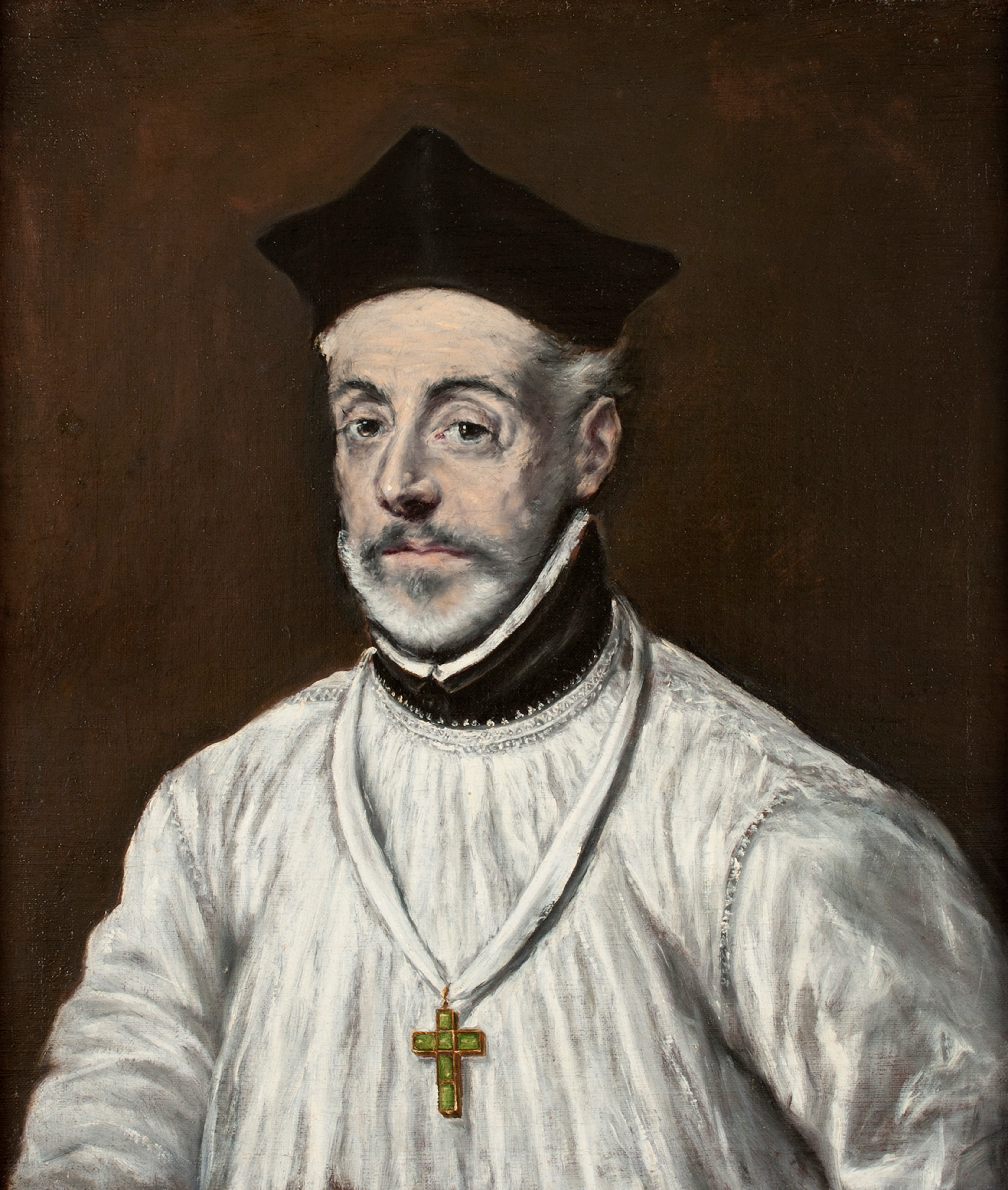 Retrato del eclesiástico español Diego de Covarrubias (1512-1577), que llegó a ser obispo de Ciudad Rodrigo, Segovia y Cuenca y arzobispo de Santo Domingo.